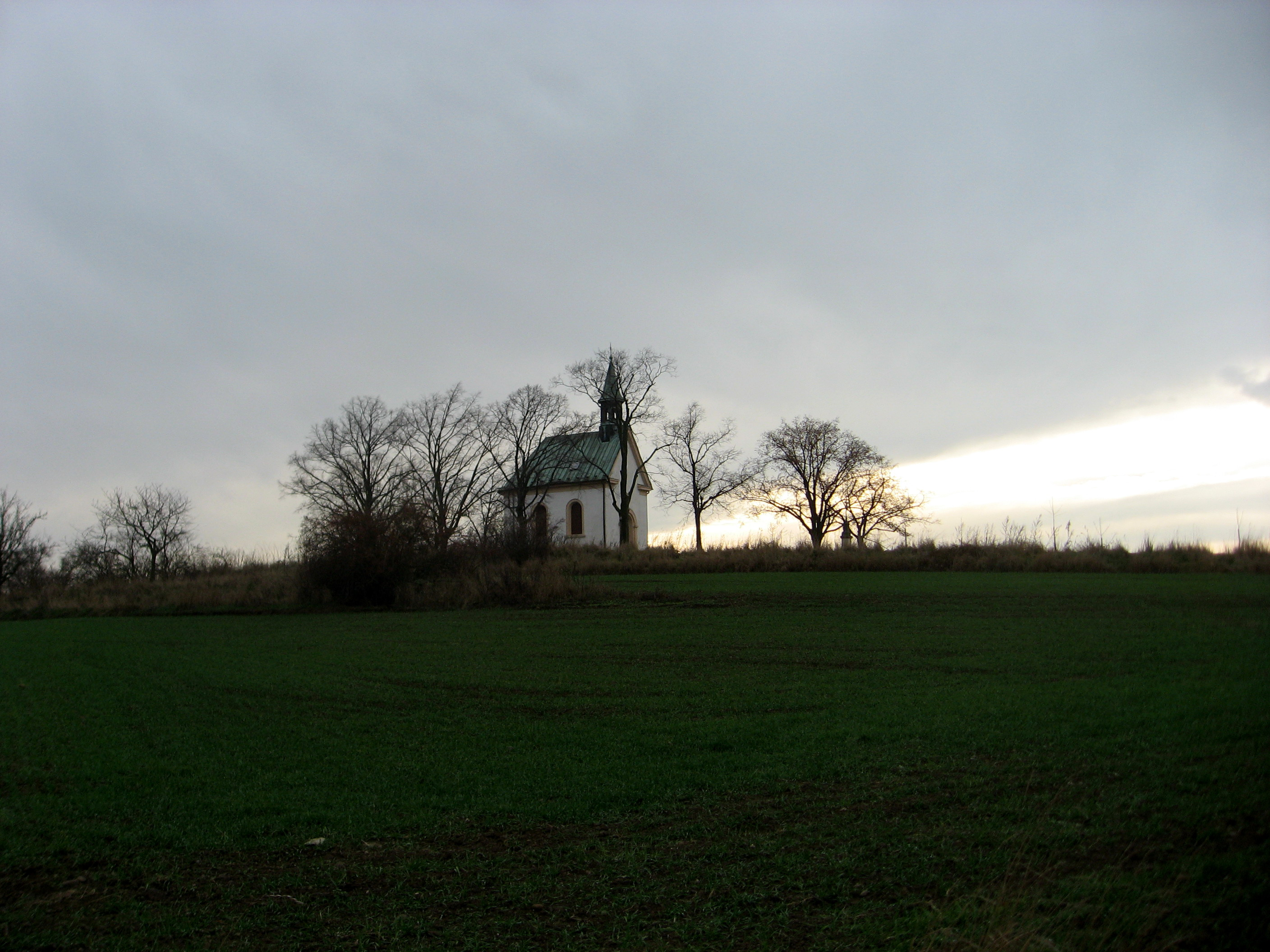 Líšeň, Kostelíček